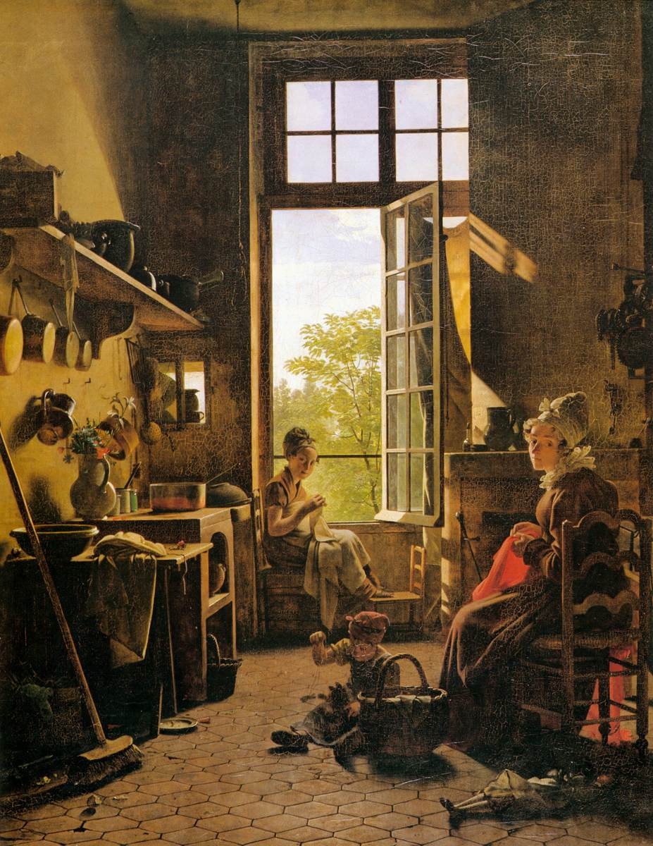 detail